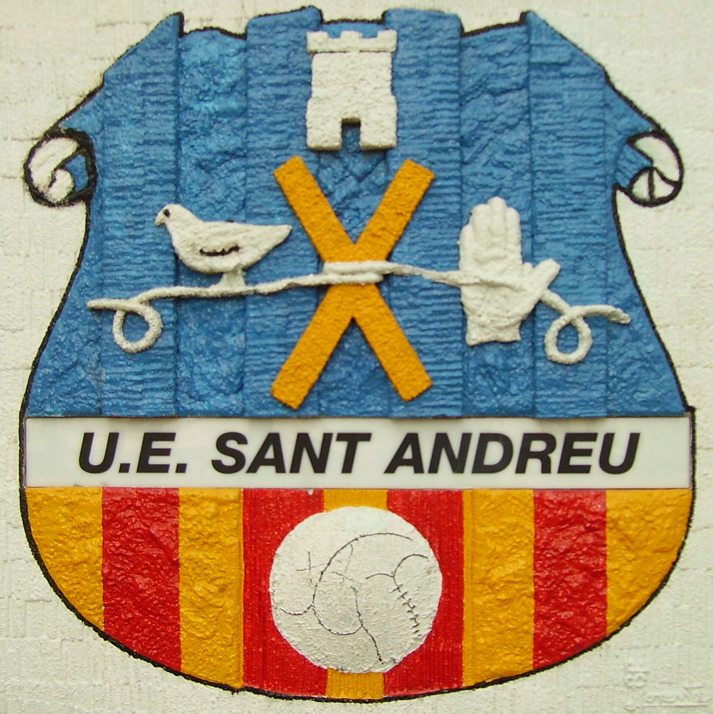 Escut de la UE Sant Andreu a l'estadi Narcís Sala.